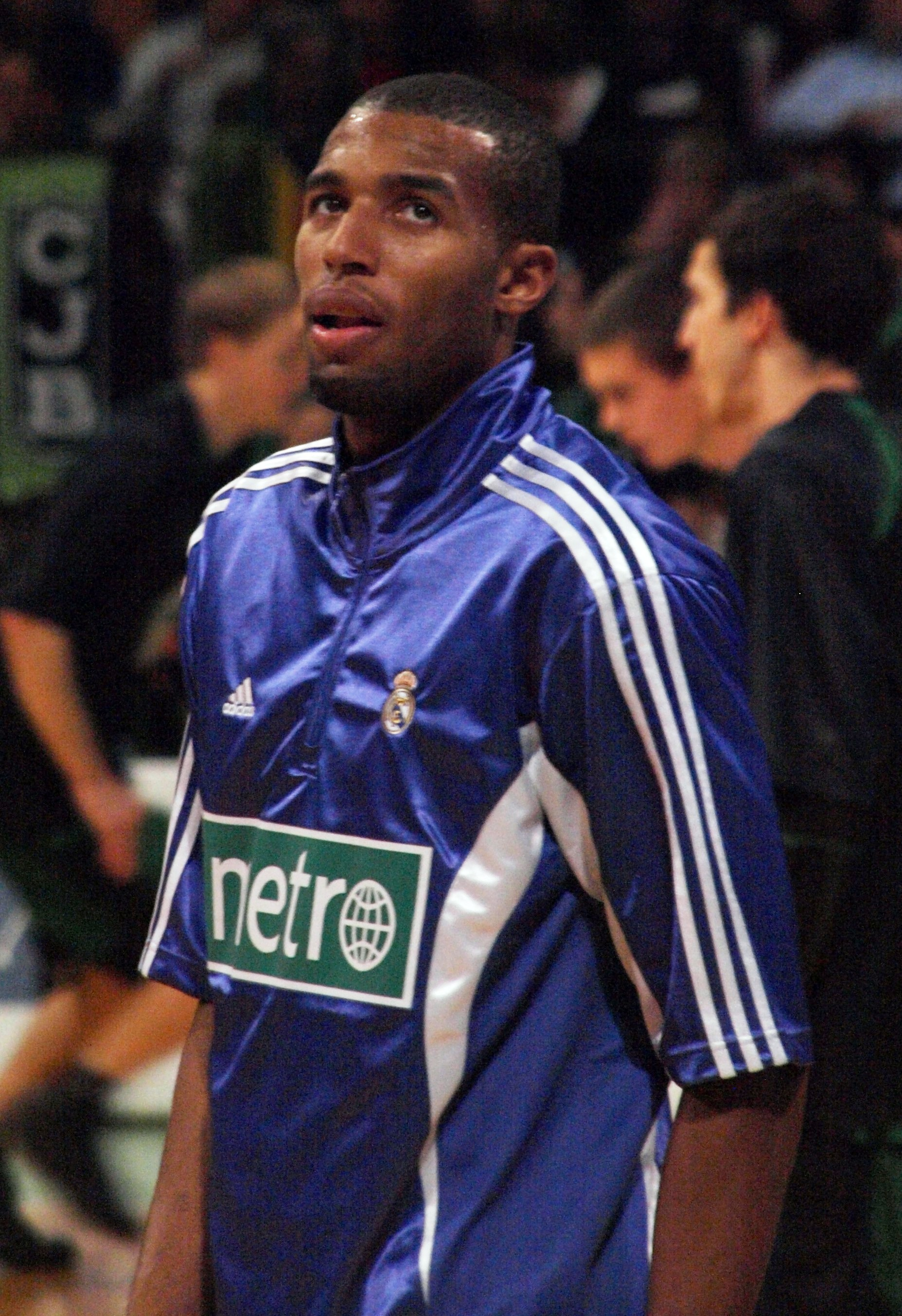 Quinton Hosley en el Olímpico de Badalona en noviembre de 2008